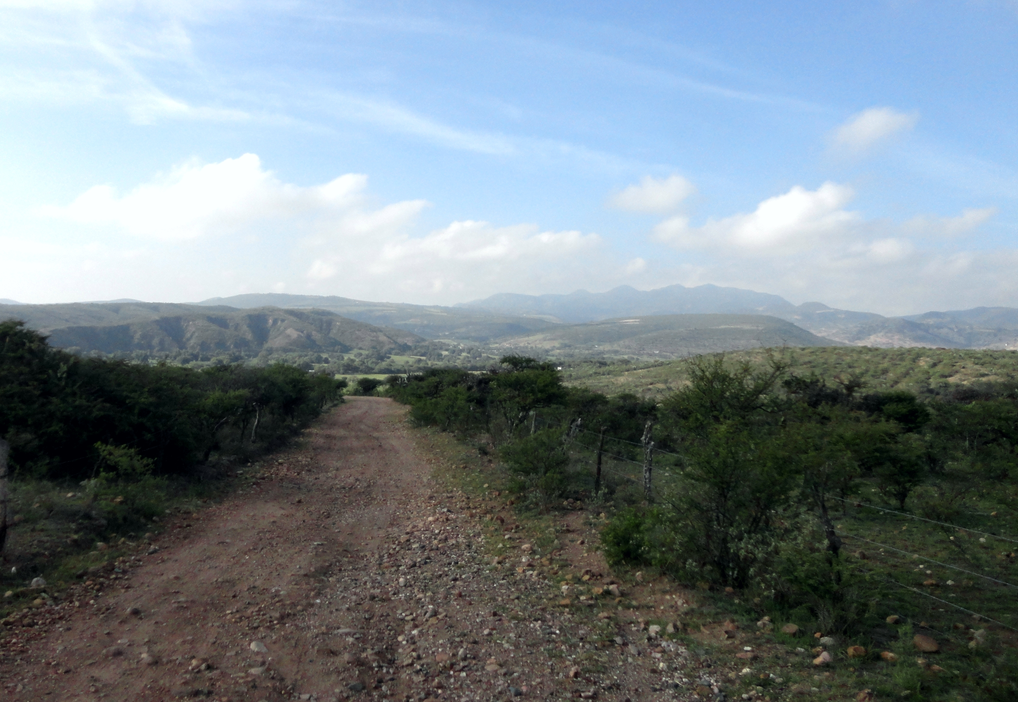 Sierra de Santa Rosa vista desde la comunidad de Río Azul, municipio de Dolores Hidalgo, Guanajuato, México.